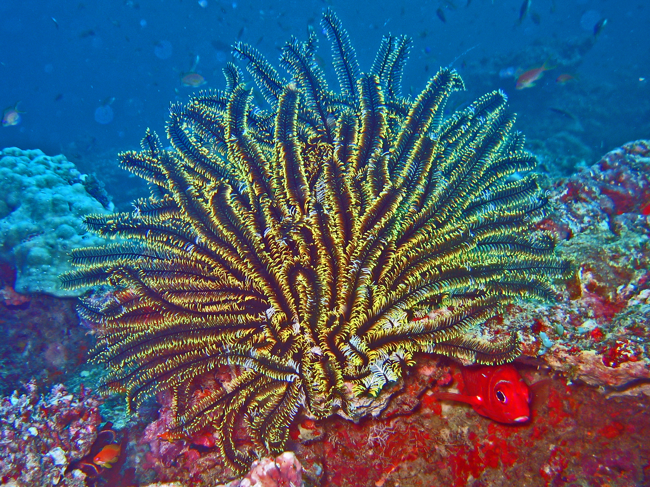 Comaster schlegeli in Maldives.